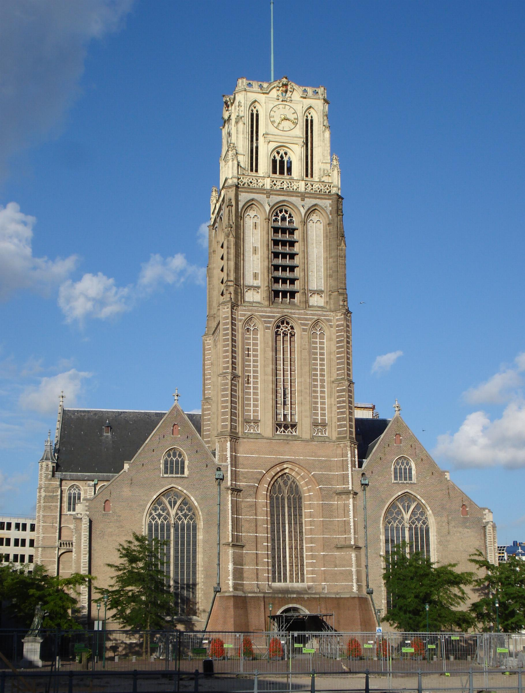 Rotterdam, Laurenskerk. Oudste gebouw van Rotterdam. Rijksmonument.